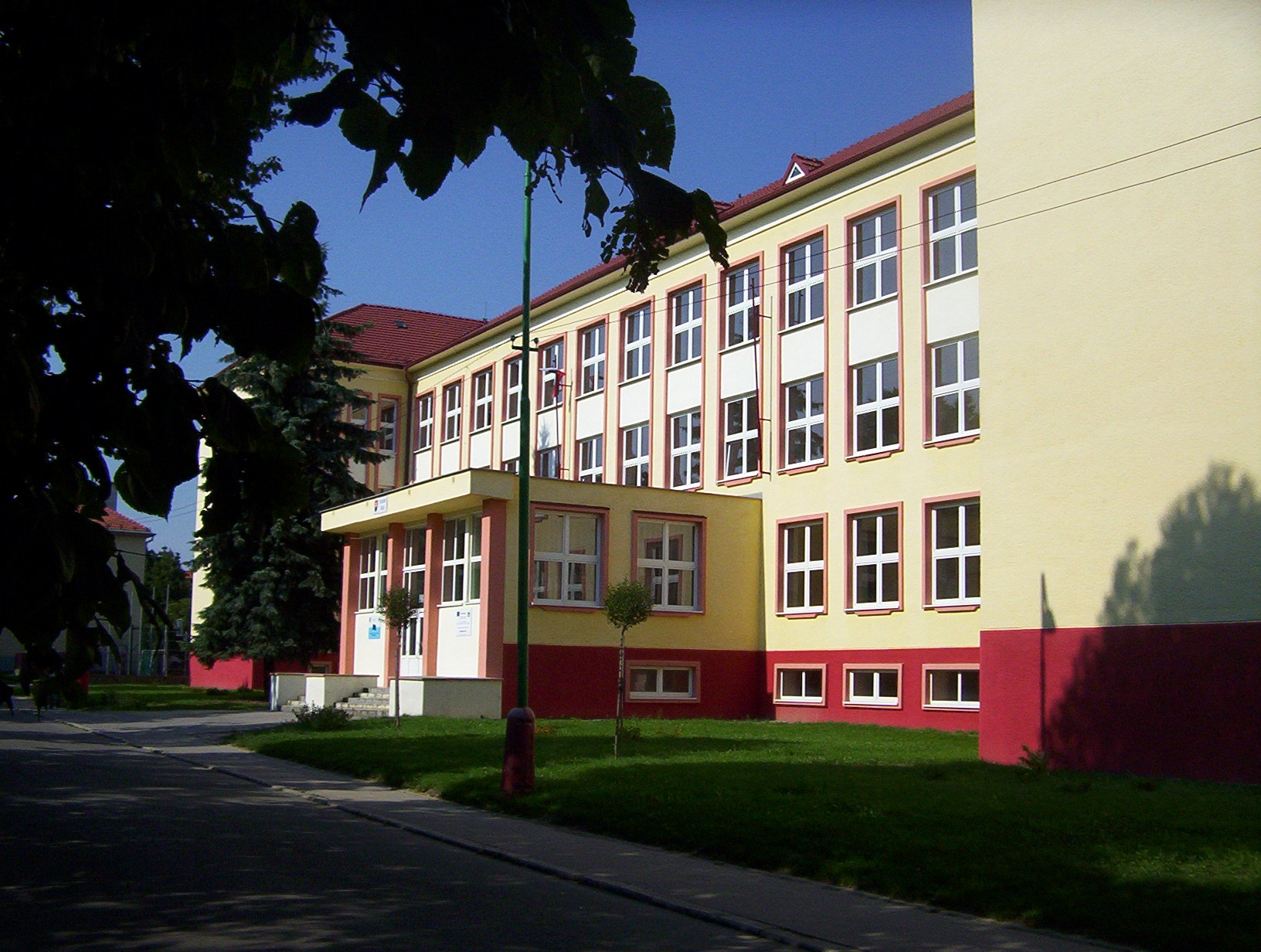 Budova II. Základnej školy Myjava